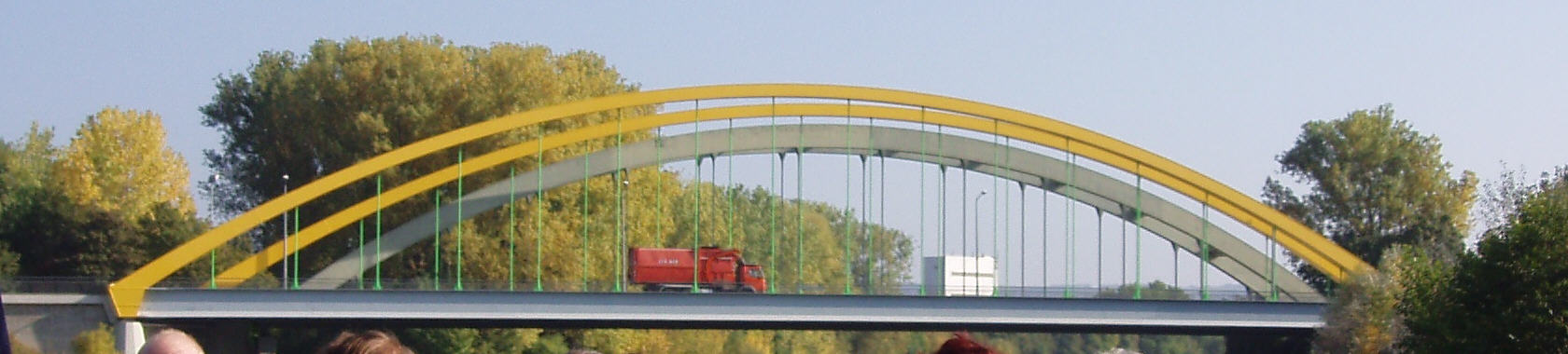 Paul-Metz-Brücke in Heilbronn (2003, Bung Beratende Ingenieure) Stabbogenbrücke aus Stahl (95 x 14)